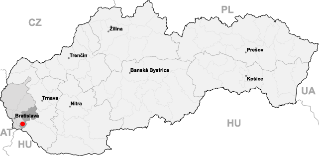 map of Slovakia, municipality of Dunajská Lužná highlighted